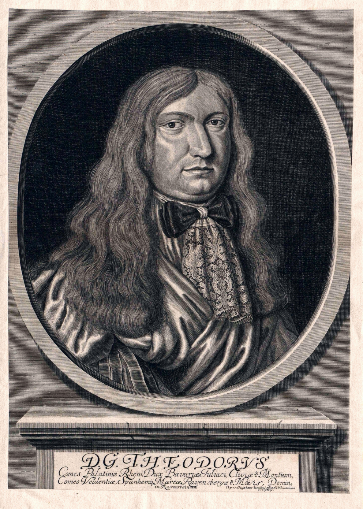 Theodor, Pfalzgraf von Sulzbach Hz von Bayern